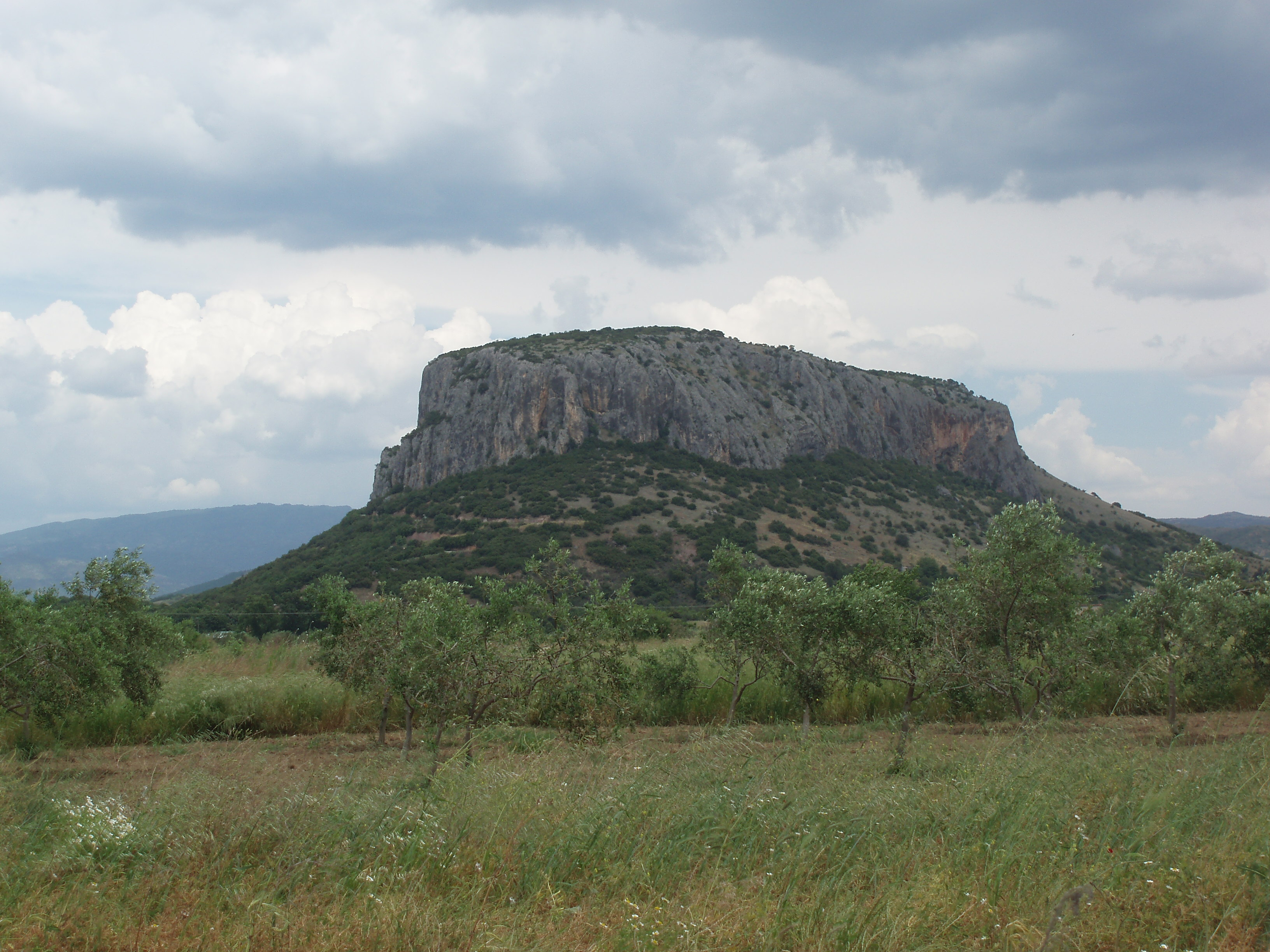 Ο βράχος όπου και το σπήλαιο